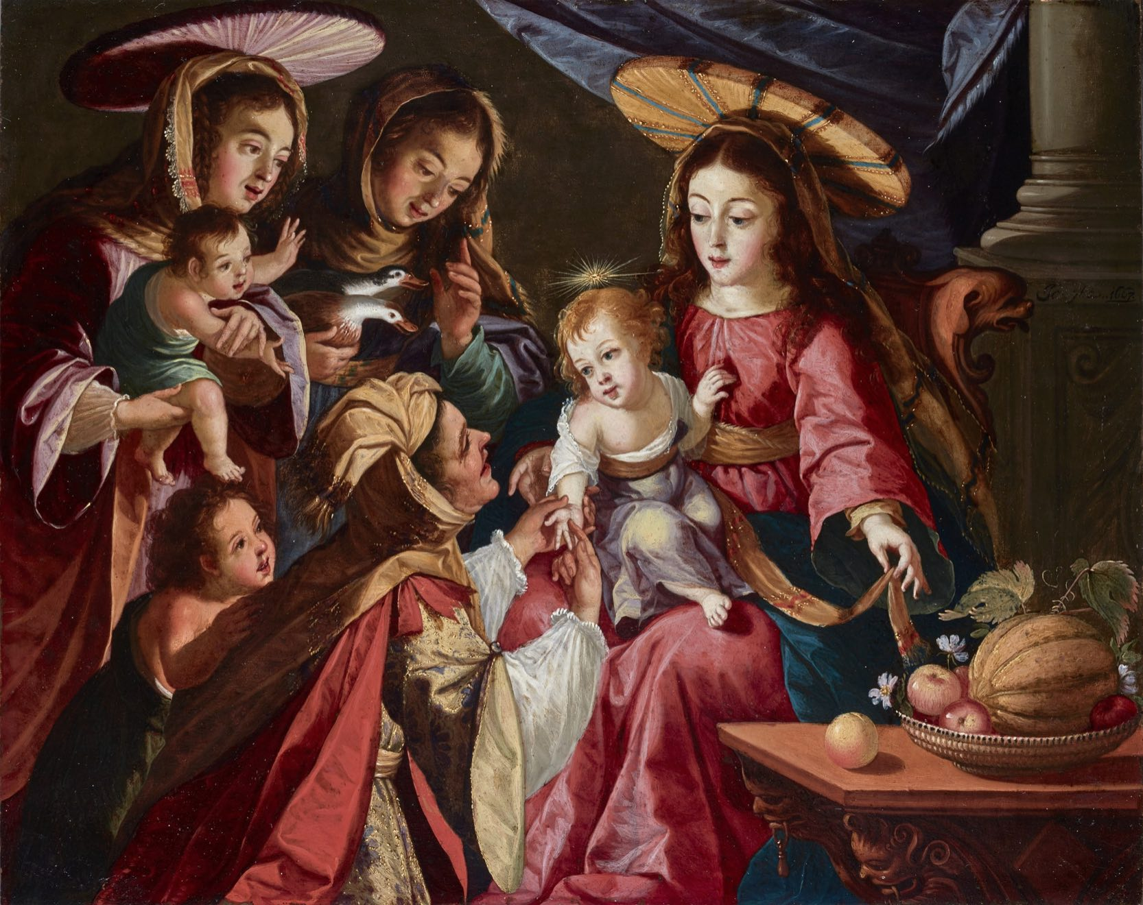 Huile sur cuivre - 23 x 29 cm Detroit, Institute of Art Photo : Galerie Jaime Eguiguren